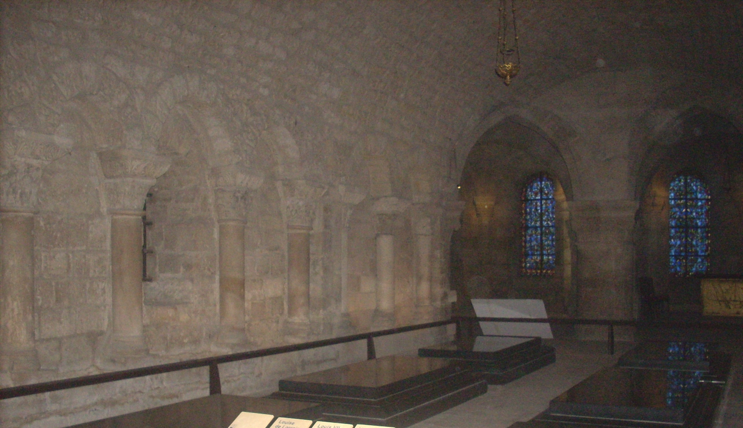 Basilique de Saint-Dénis, crypte, chapelle d'Hildouin (839)